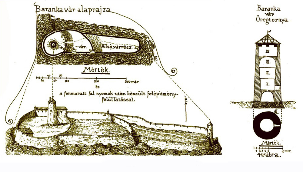 Бронецький замок (план)